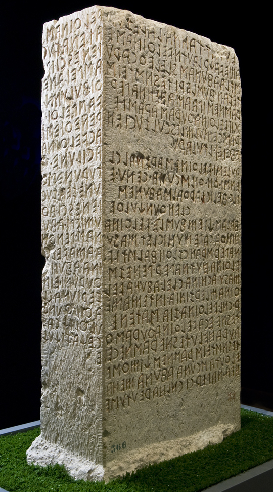 Perugia, Museo archeologico Nazionale dell'Umbria, cippo di Perugia, III sec. a.C.